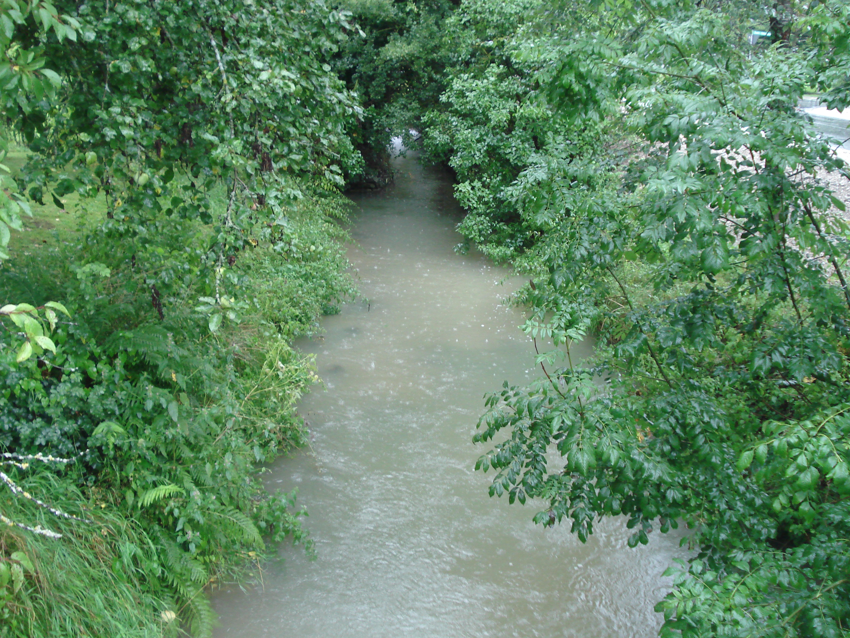 Die Bachhaupter Laber in Breitenbrunn